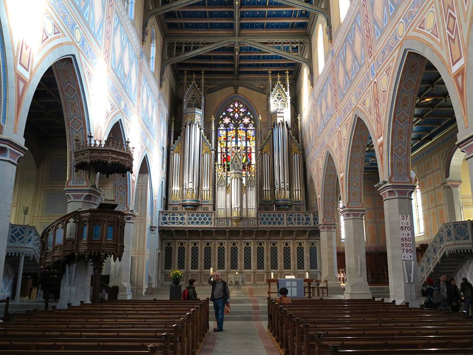 Blick durch das Langhaus auf die Orgel. Bild: A.F.